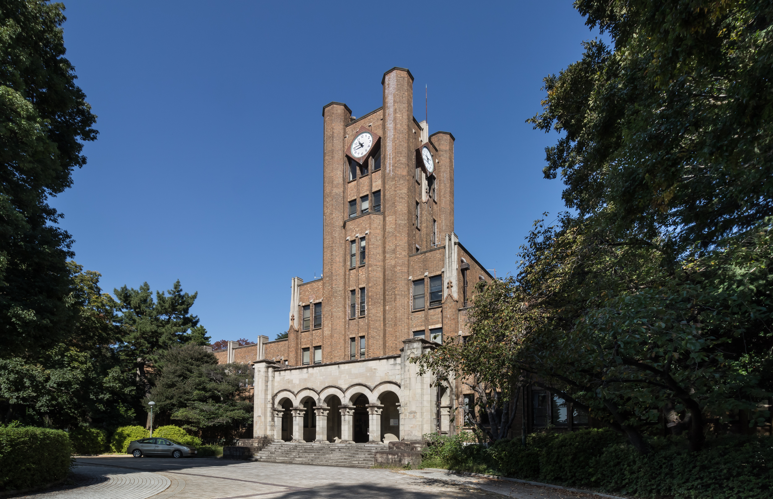 東京大学駒場Iキャンパス1号館(東京都目黒区)。旧第一高等学校本館。内田祥三設計（1931）